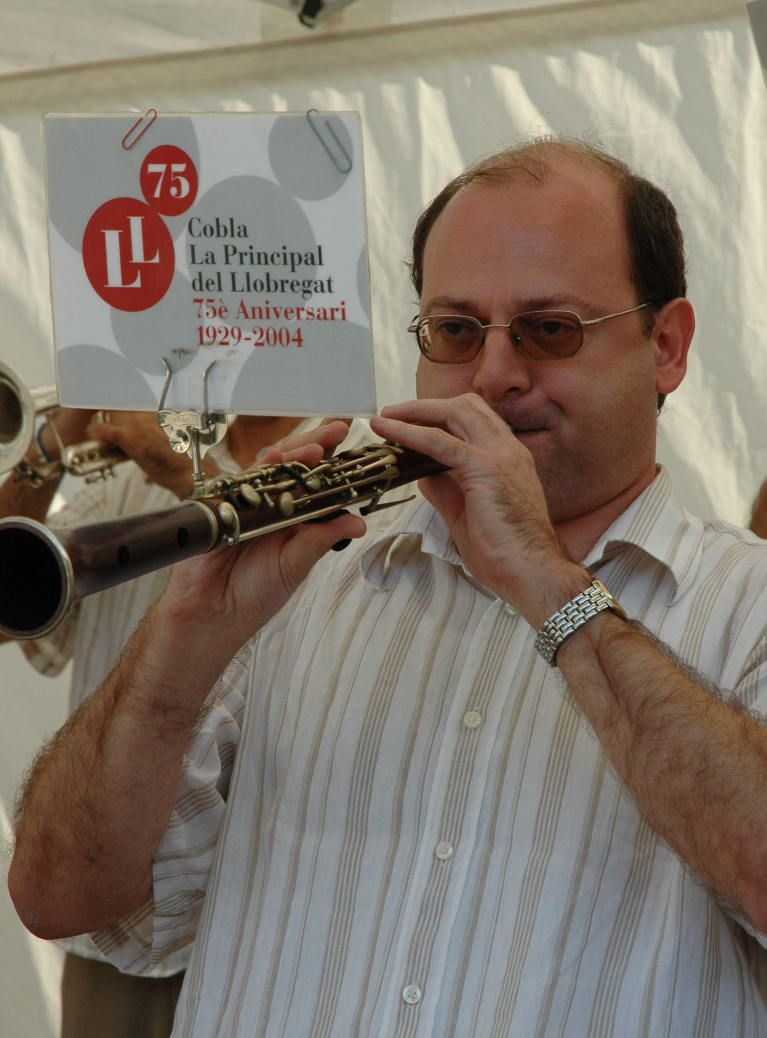 Jordi Vilaró